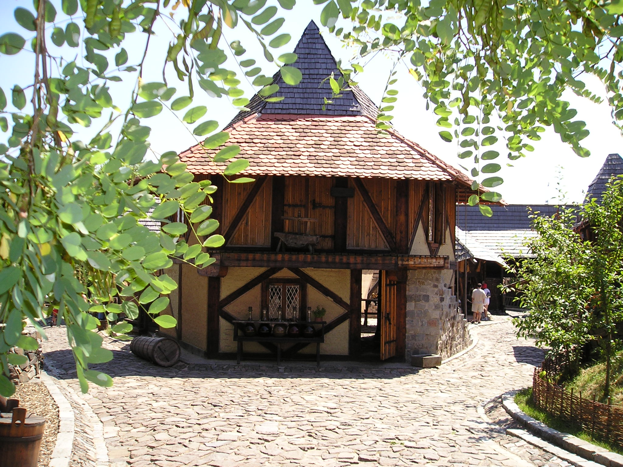 Skanzen v Ostré (Ostrá open-air museum; Czech Republic)